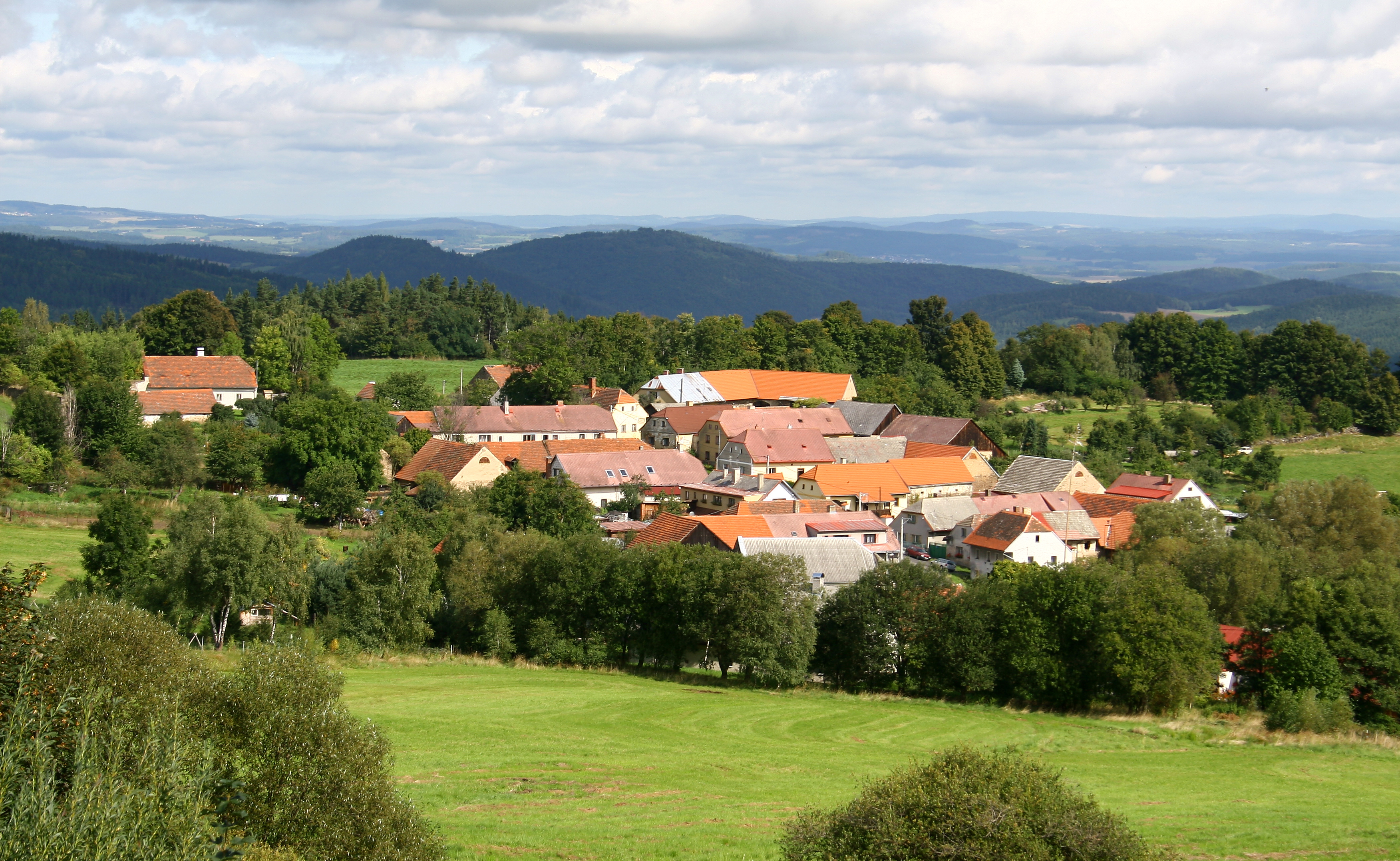 Pohled na severní část Albrechtic od kostela svatého Petra a Pavla. Okres Klatovy, Plzeňský kraj, Česká republika.